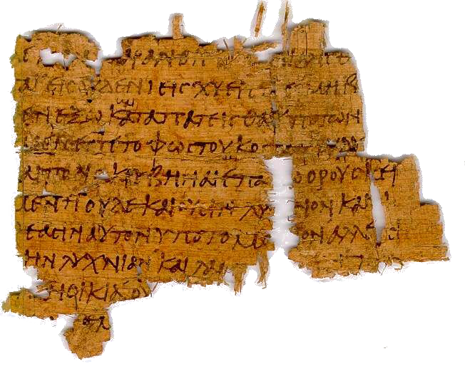 Anverso del Papiro P86 del Nuevo Testamento en griego, conteniendo los versículos 13, 14, 15 y 16 del Capítulo 5 del Evangelio según San Mateo. Fechado en torno al s. IV E.C.: 13 "Vosotros sois la sal de la tierra; pero si la sal se desvaneciere, ¿con qué será salada? No sirve más para nada, sino para ser echada fuera y hollada por los hombres. 14 Vosotros sois la luz del mundo; una ciudad asentada sobre un monte no se puede esconder. 15 Ni se enciende una luz y se pone debajo de un almud, sino sobre el candelero, y alumbra a todos los que están en casa. 16 Así alumbre vuestra luz delante de los hombres, para que vean vuestras buenas obras, y glorifiquen a vuestro Padre que está en los cielos." Mt 5: 13-16